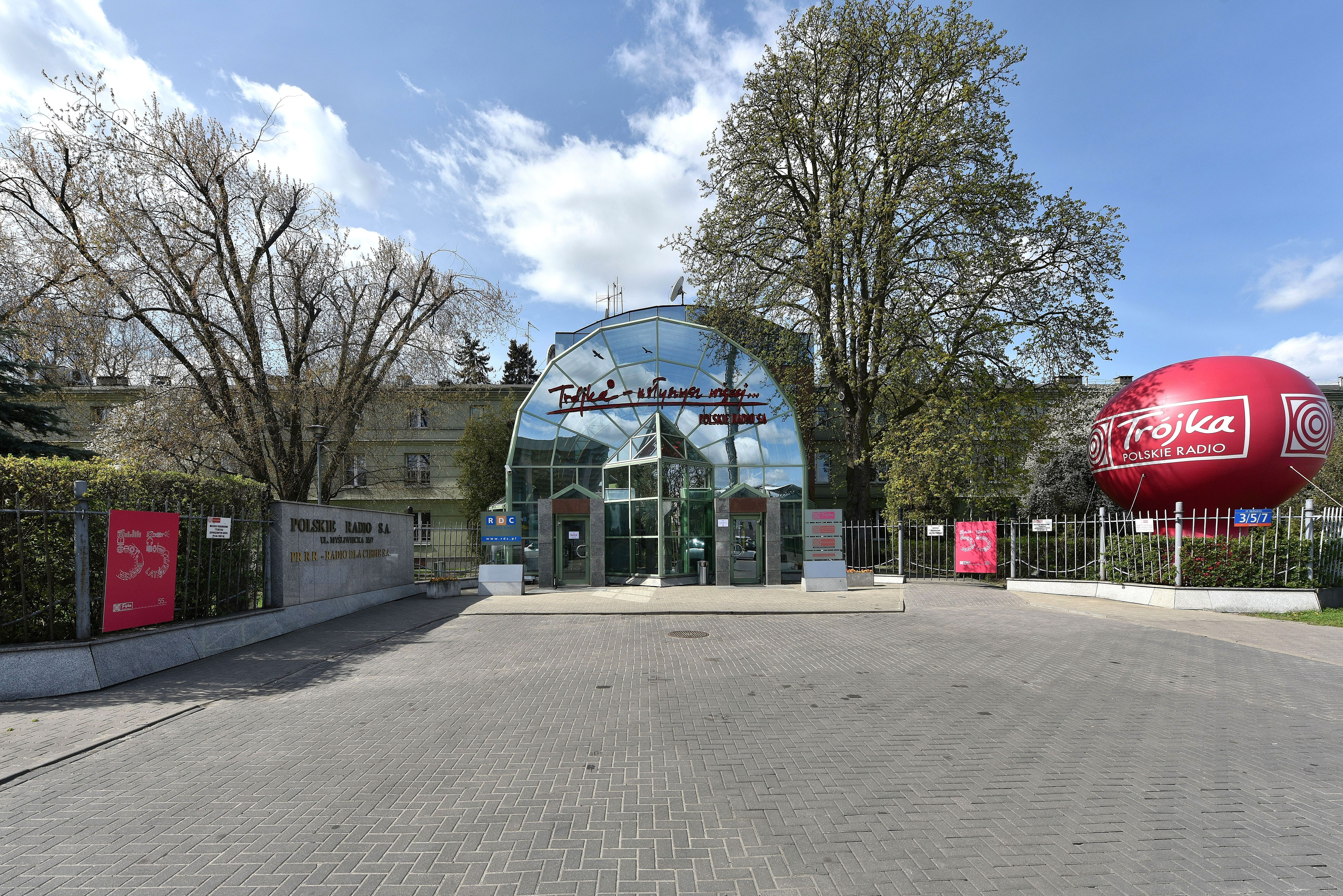 Siedziby Program 3. Polskiego Radia i Radia dla Ciebie ul. Myśliwiecka 3/5/7 w Warszawie